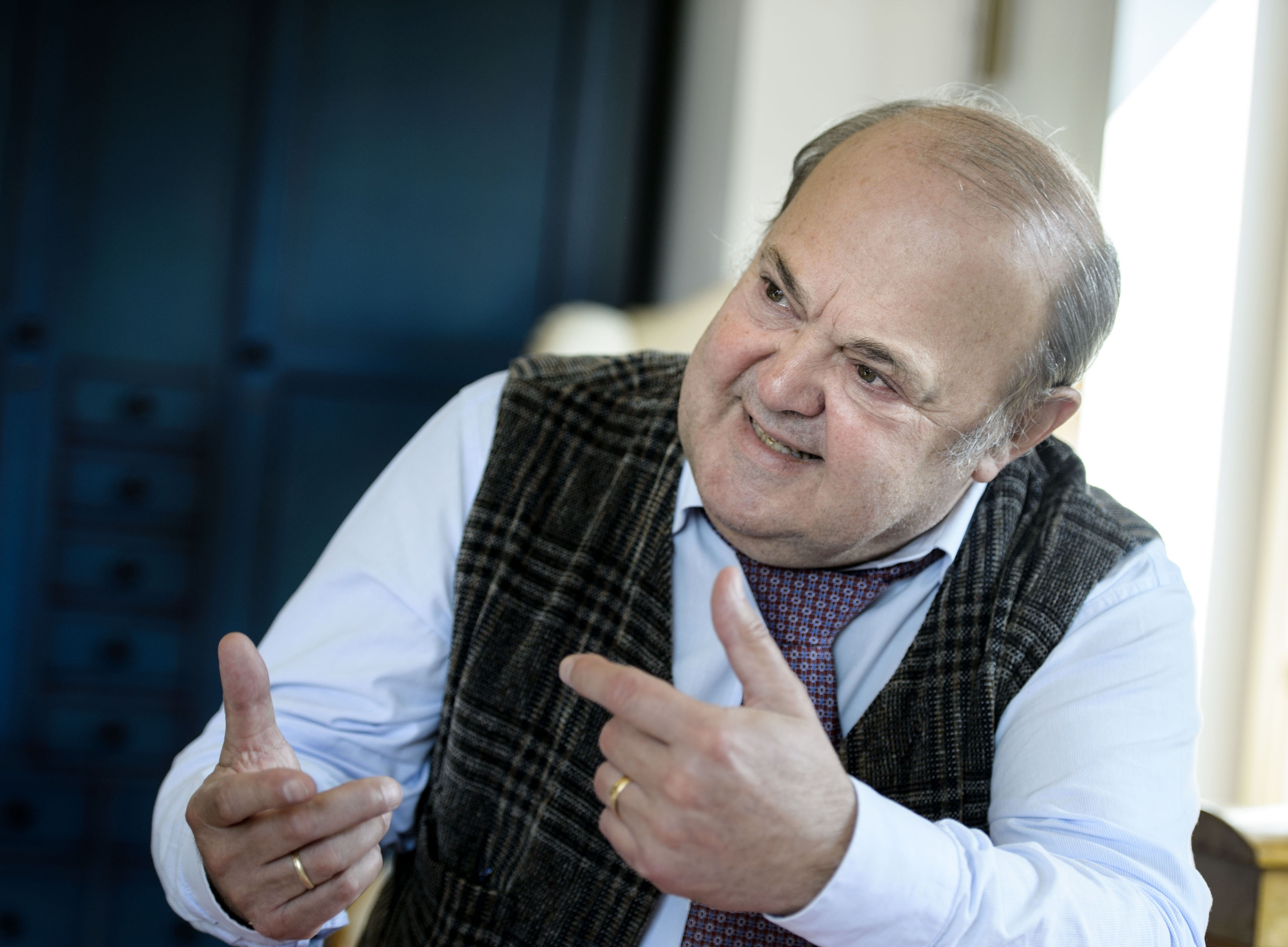 Werner W. Ernst - Interview Tiroler Tageszeitung (Copyright: Thomas Böhm)